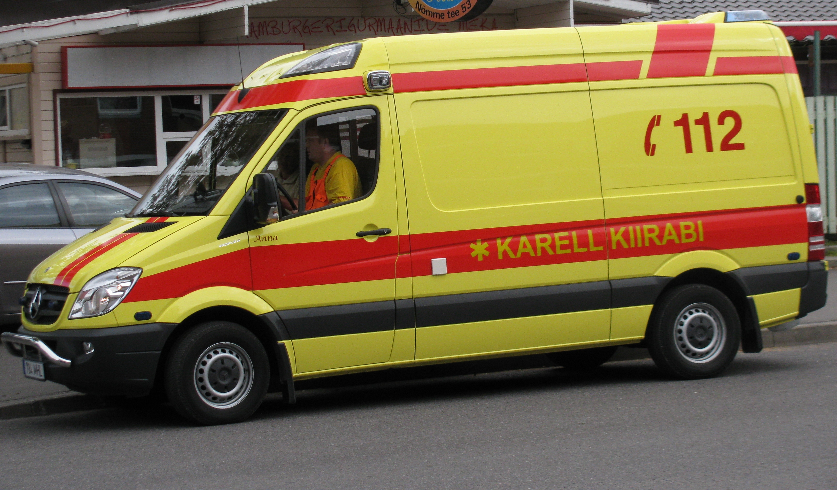 AS Karell Kiirabi kiirabiauto Tallinnas.